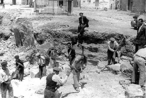 Cava di pietra in Piano S.ta Maria (1953)